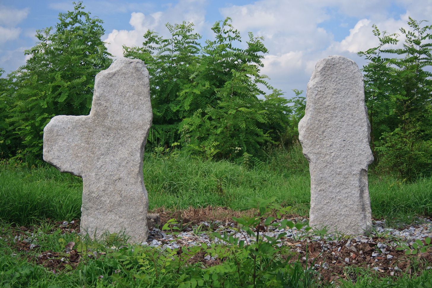 Krzyże kamienne z Karnczej Góry